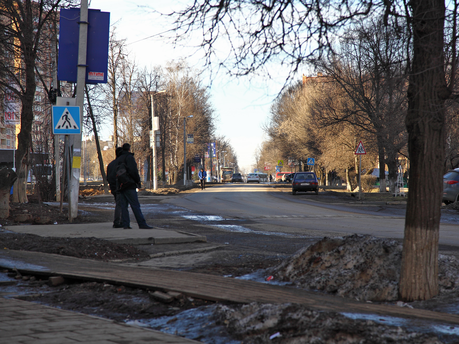 Улица Александры Монаховой в поселке Коммунарка до начала реконструкции (март 2014)